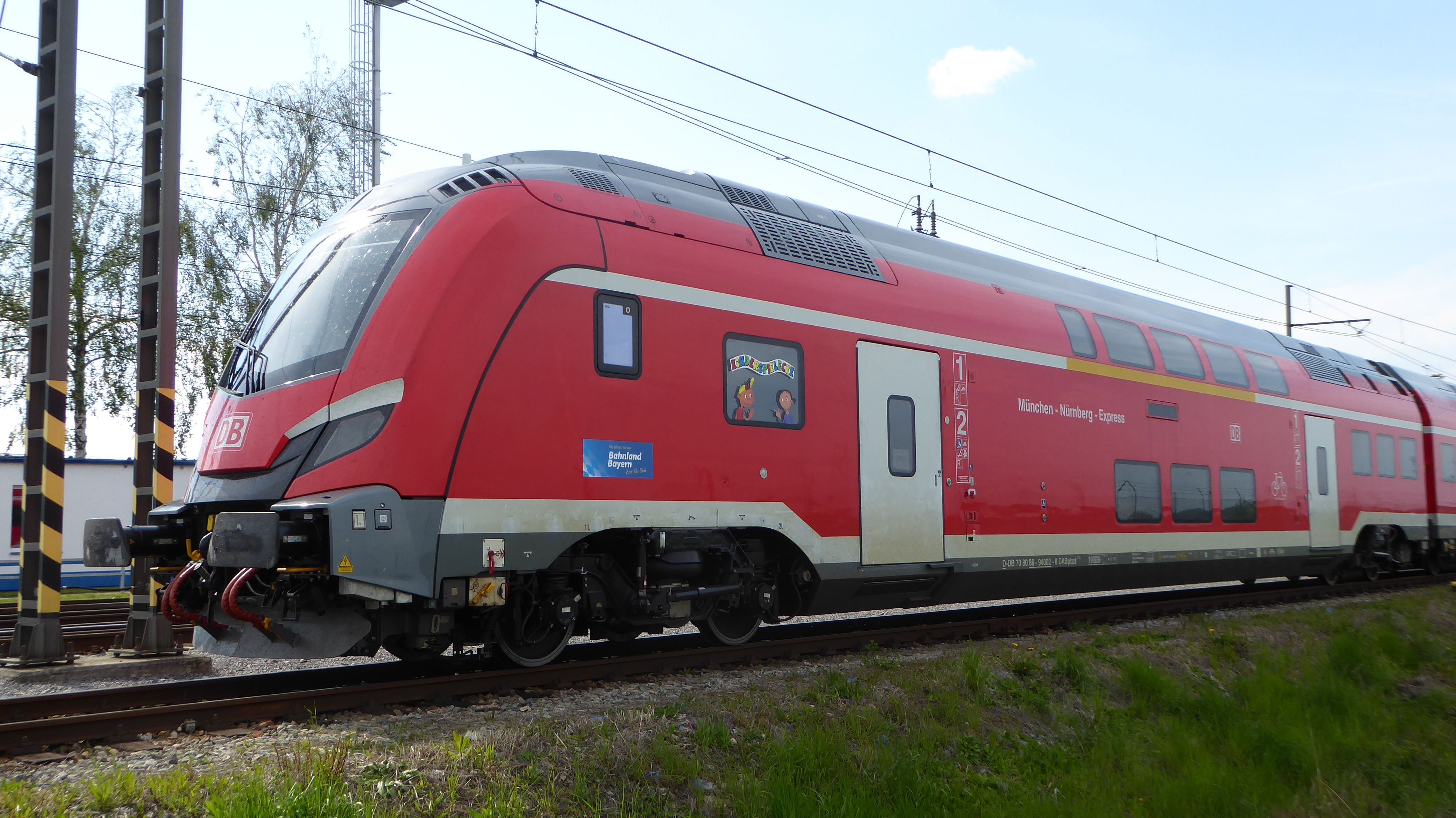 Doppelstock-Steuerwagen DABpbzf 70 80 86-94002-8 des München-Nürnberg-Express auf dem Eisenbahnversuchsring Velim (CZ)